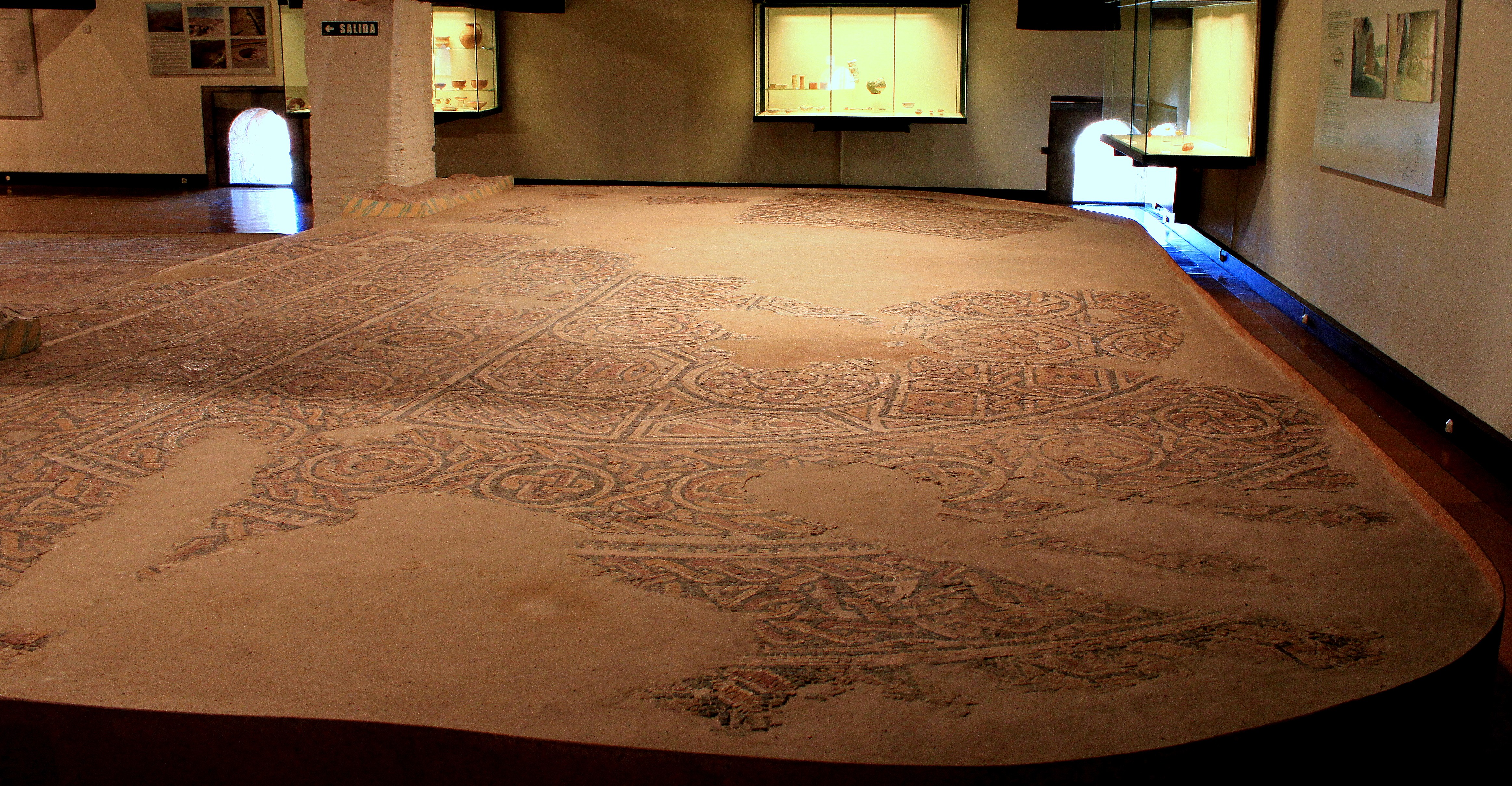 Camino de la Vega de Albalate (Calanda, Teruel): La villa: 3ª habitación.